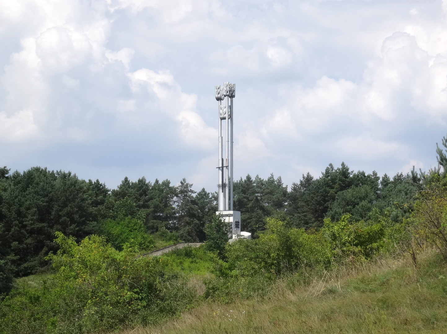 Pomnik poległych w Dolinie Śmierci w Bydgoszczy-Fordonie